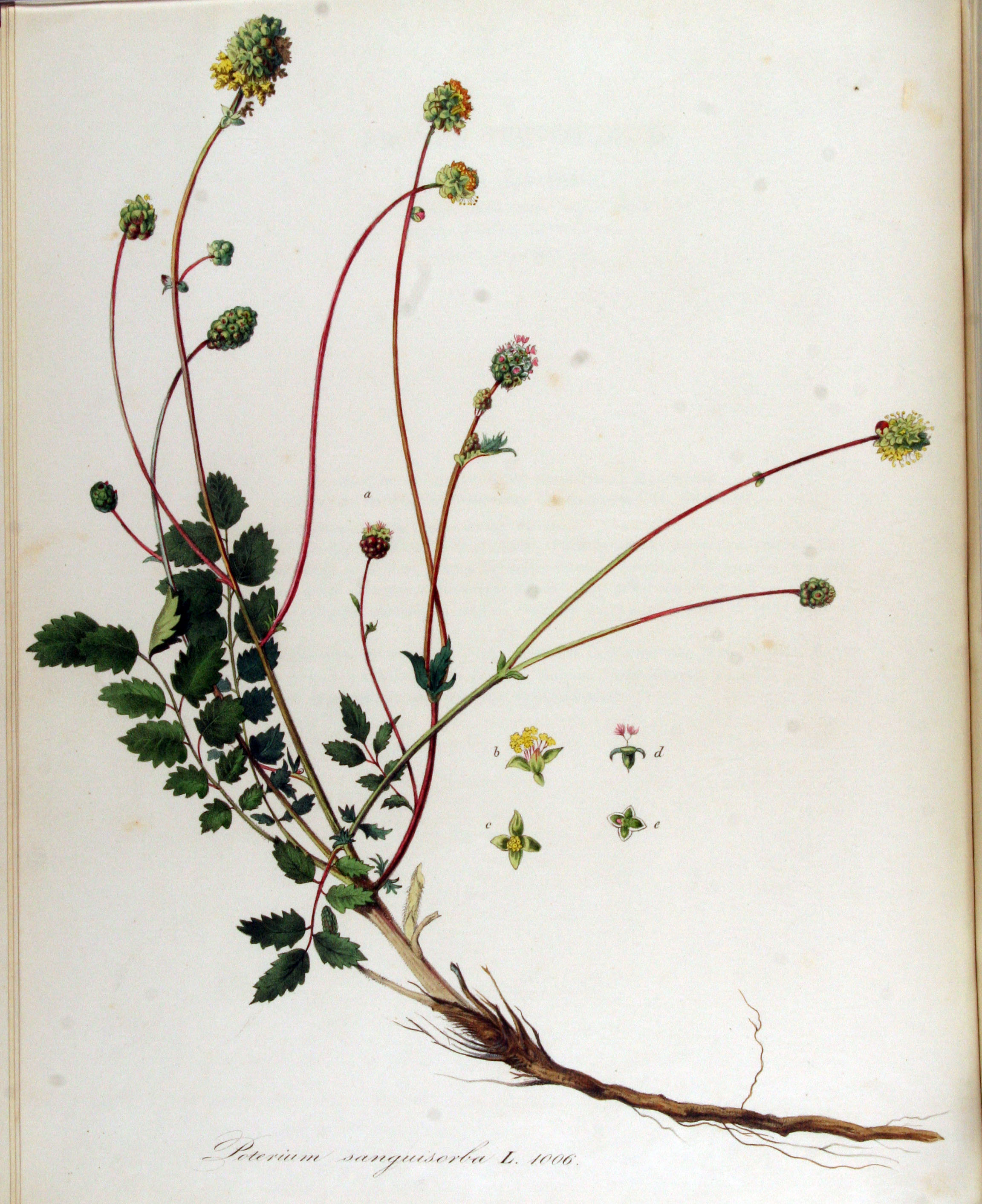 Sanguisorba minor Scop. (Syn. Poterium sanguisorba L.)